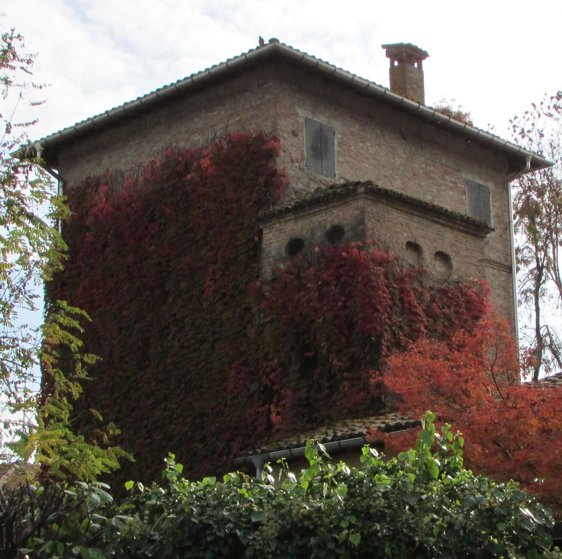 vista del torrione di Coenzo dal lato nord ovest